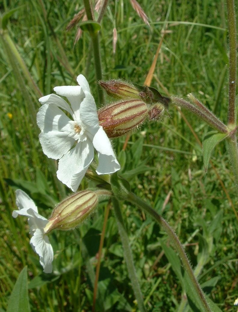 Compagnon blanc, Gy, mai 2004